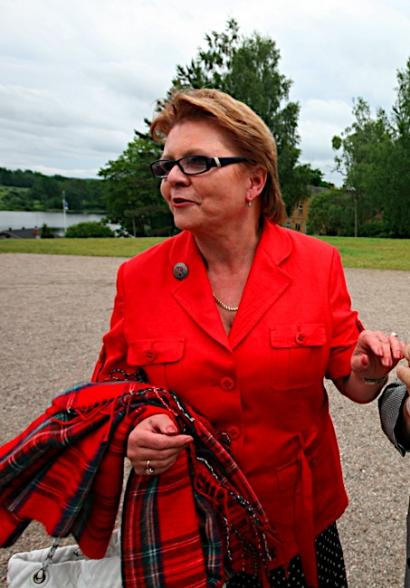 Siiri Oviir Eesti Ema monumendi avamisel